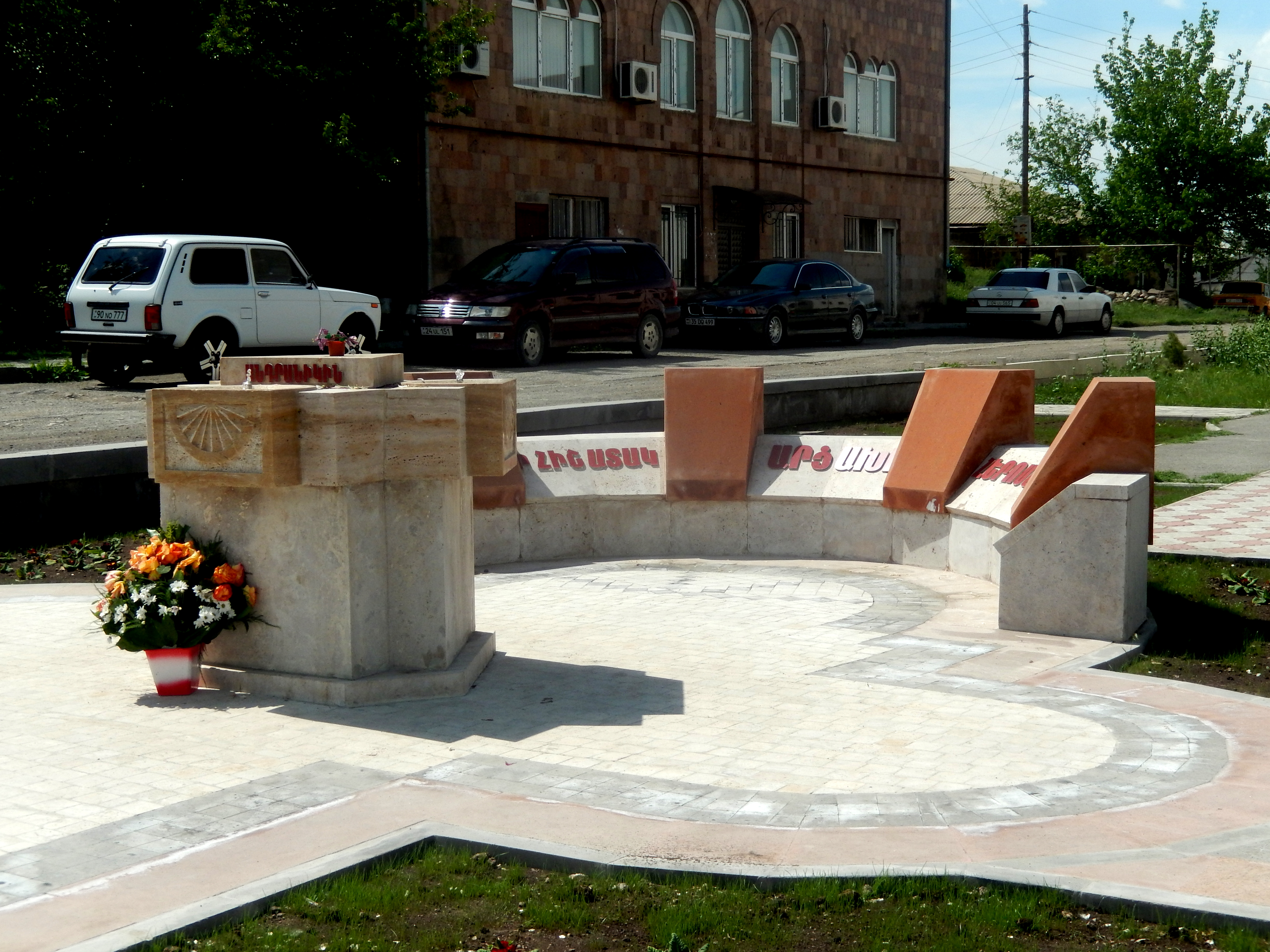 Memorial for A. Zohrabyan, Vedi